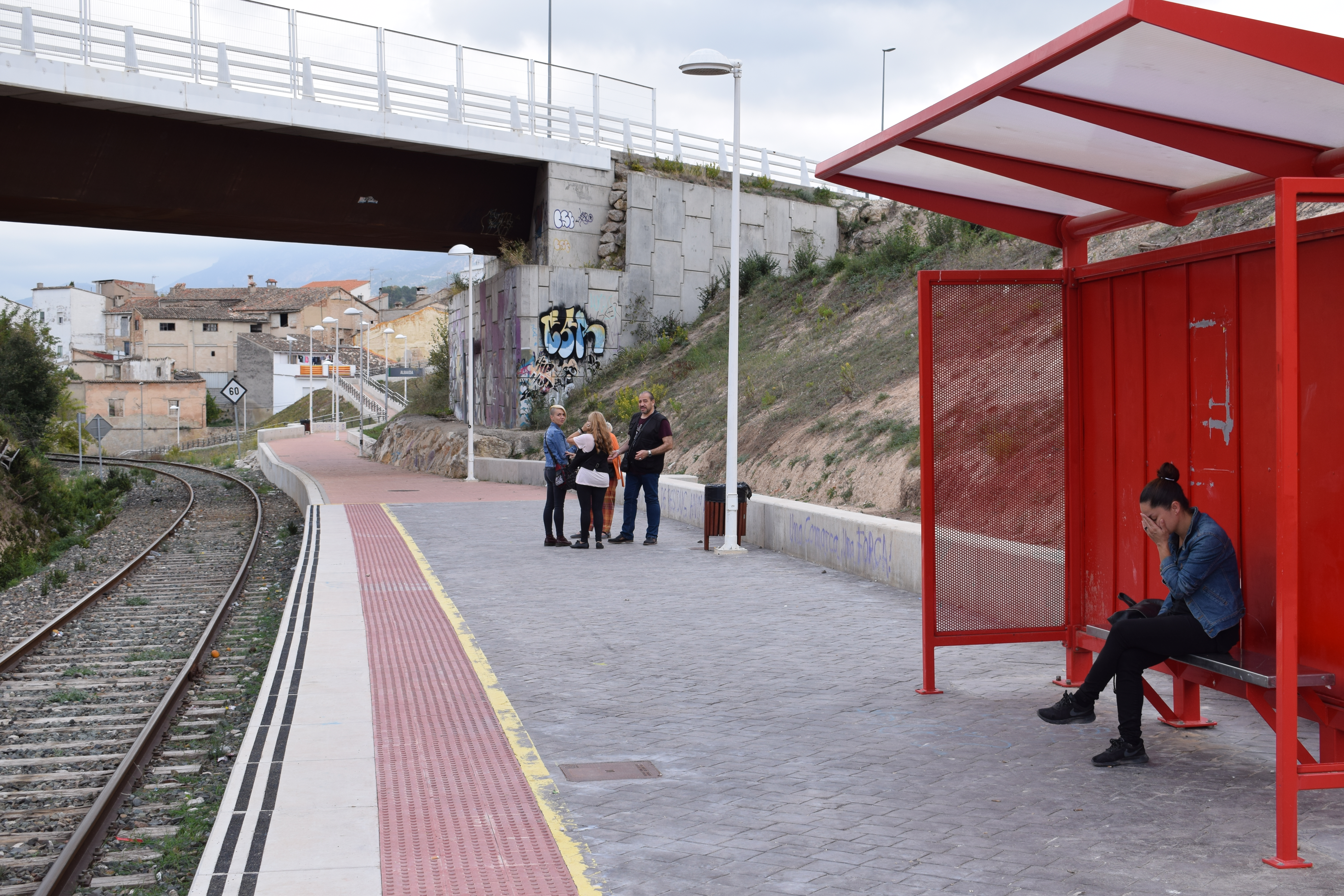 Albaida.